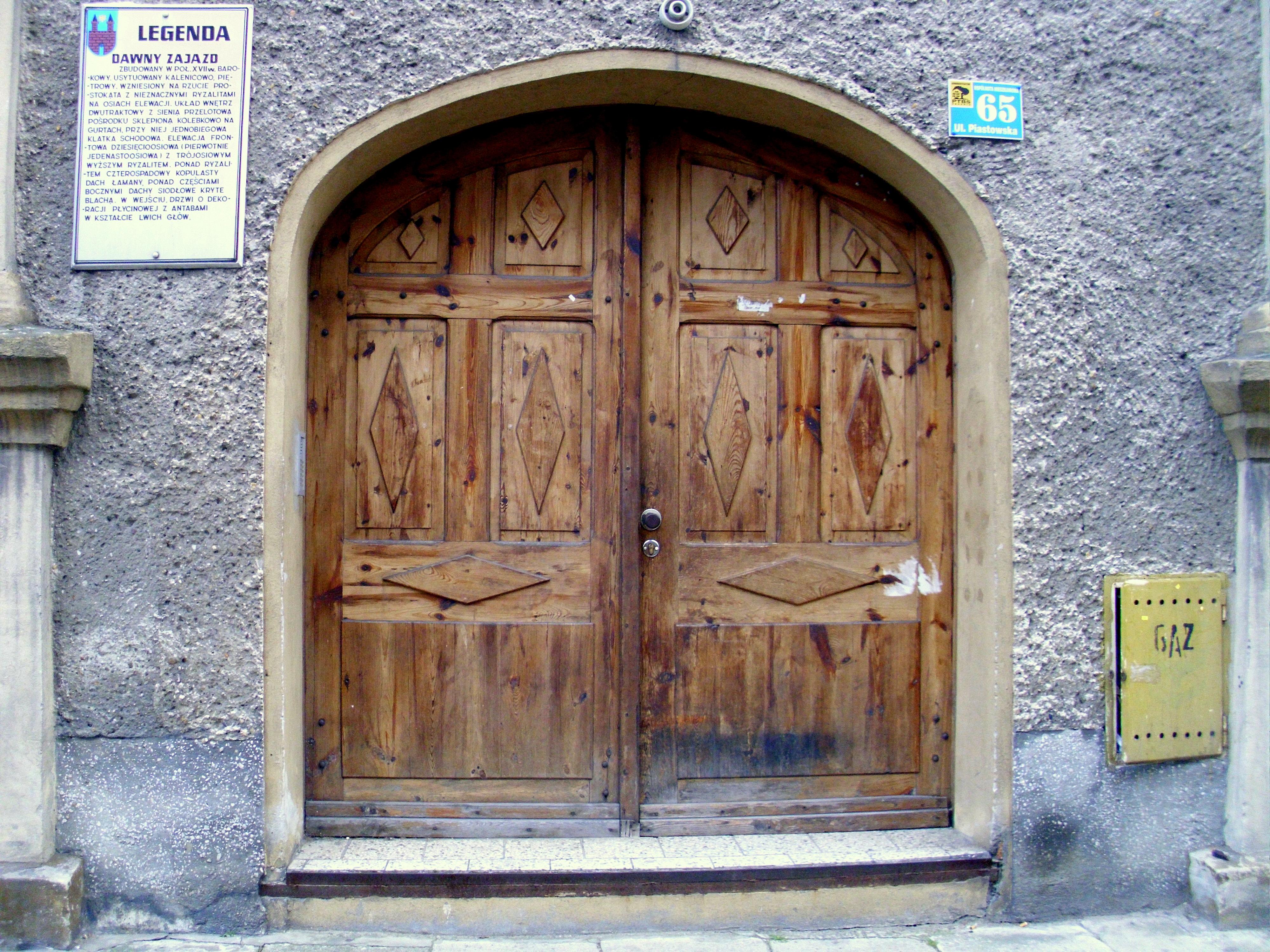 Prudnik, dawny zajazd, poł. XVIII 05.1964.